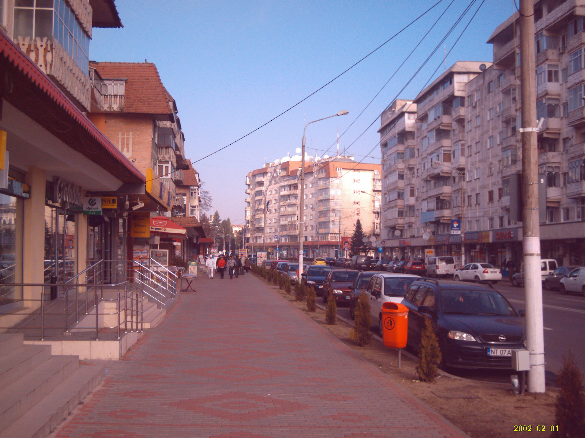 centru roman